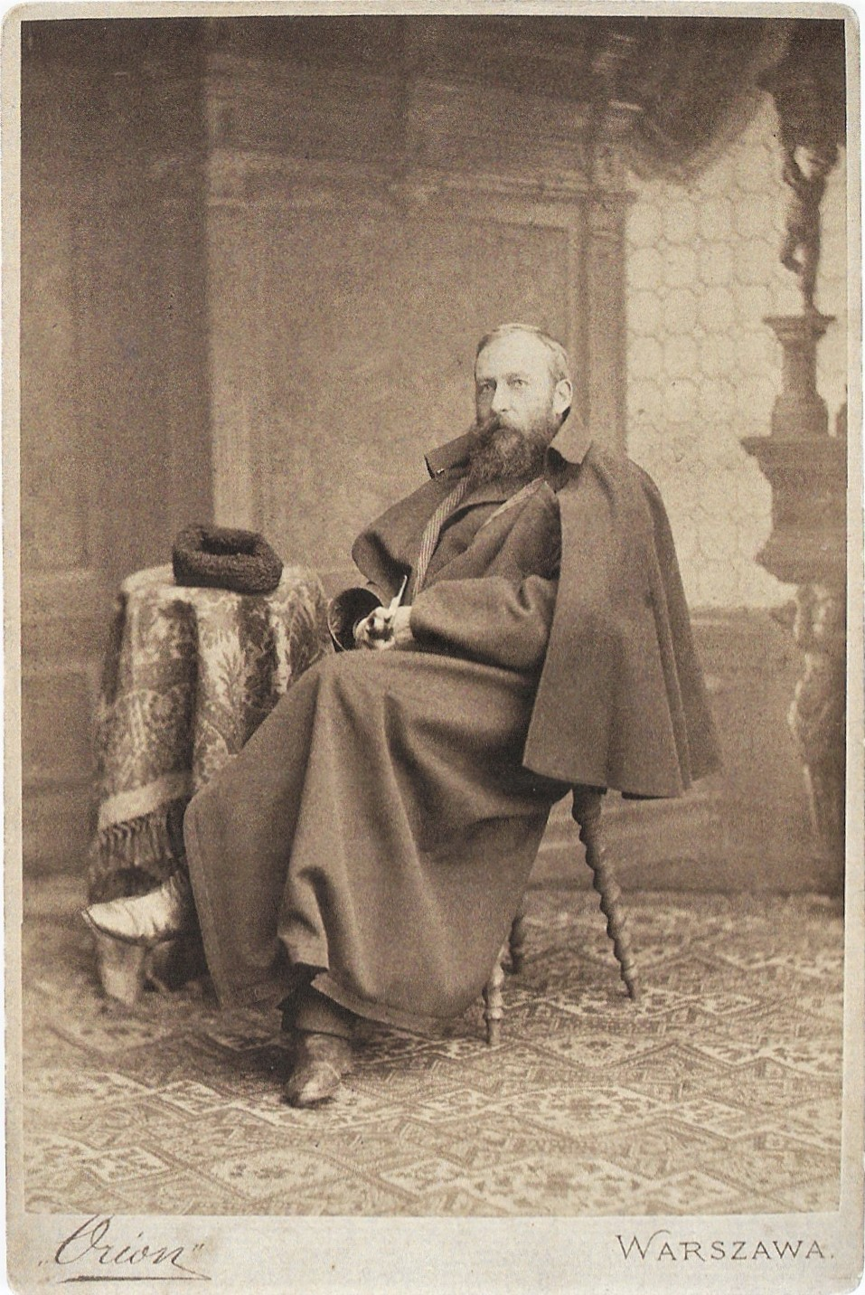 Porträt of Józef Chełmoński. photograph